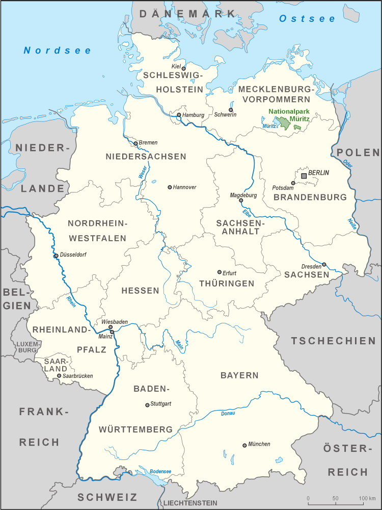 Karte des Müritz-Nationalparks in Deutschland